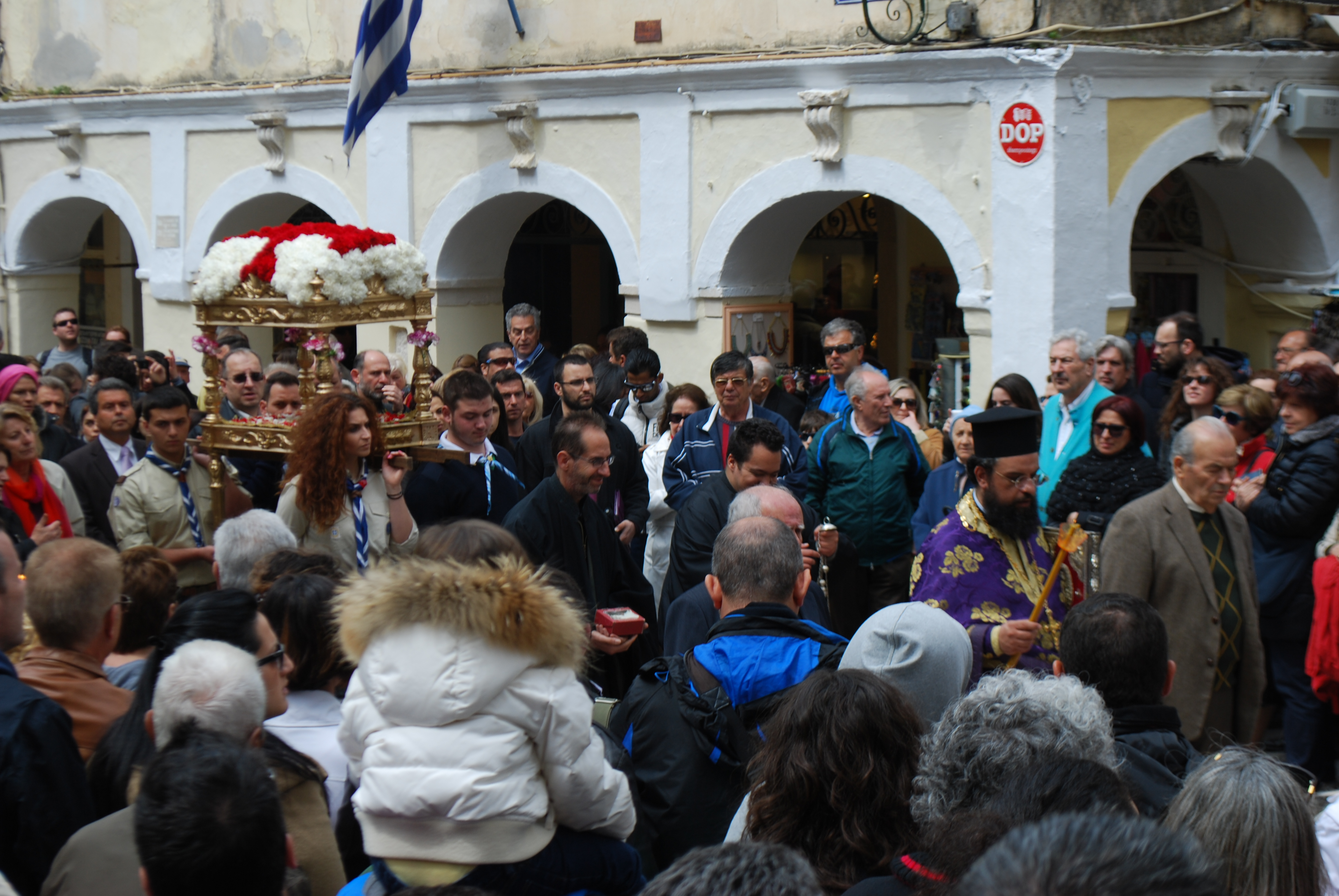 Vue de la ville de Corfou.